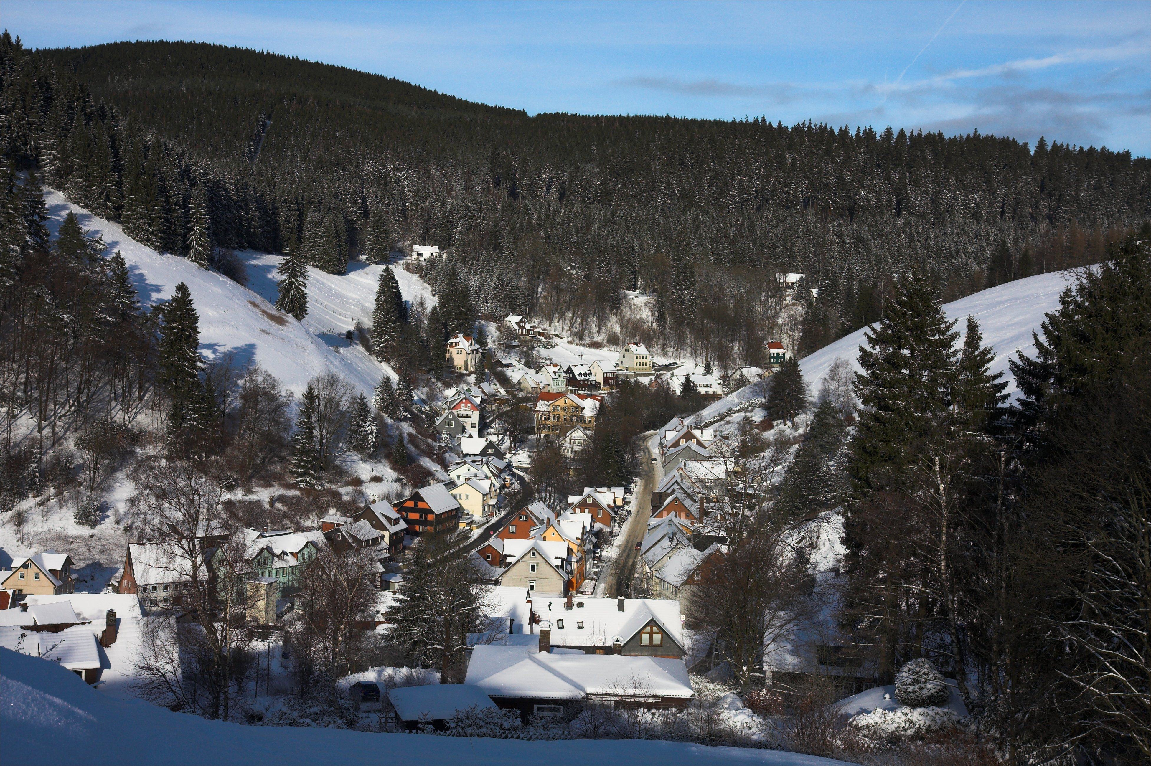 Blick auf das Ortszentrum von Wildemann und das untere Spiegeltal vom Gallenberg